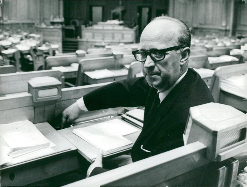 Ingemund Bengtsson. Införd i Svenska Dagbladet 1966-04-02 sid 19.